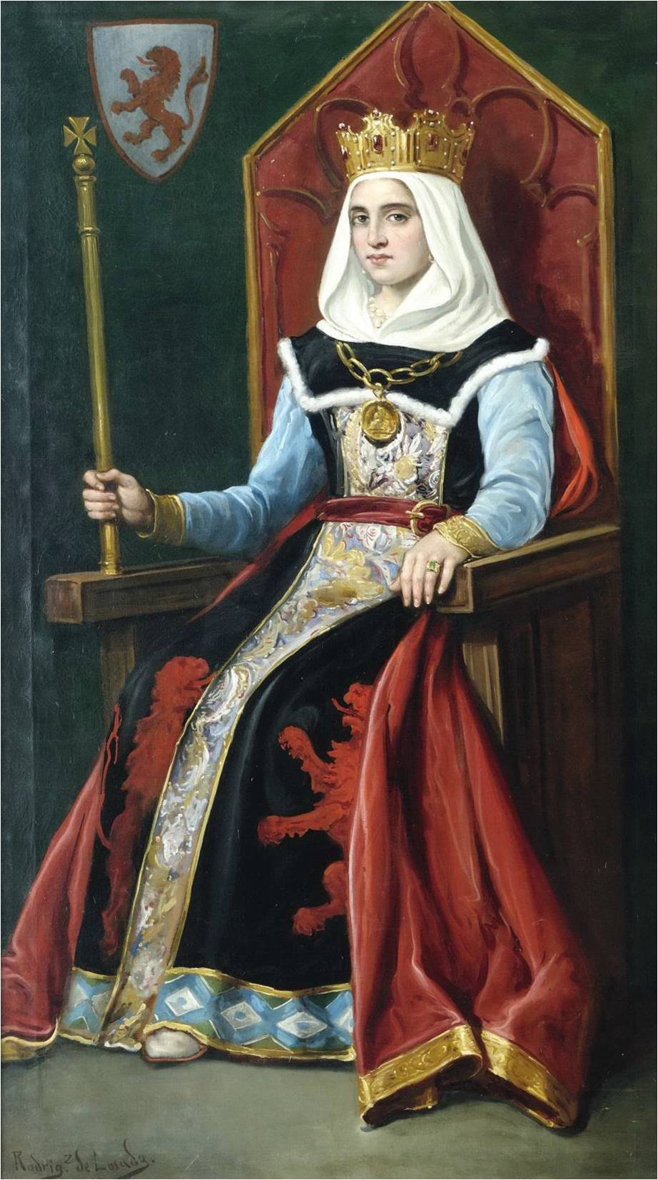 Retrato imaginario de la reina Urraca I de León (1081-1126). Fue hija del rey Alfonso VI de León y de la reina Constanza de Borgoña. Falleció en 1126, a los 44 años de edad y fue sucedida en el trono por su hijo, Alfonso VII de León.